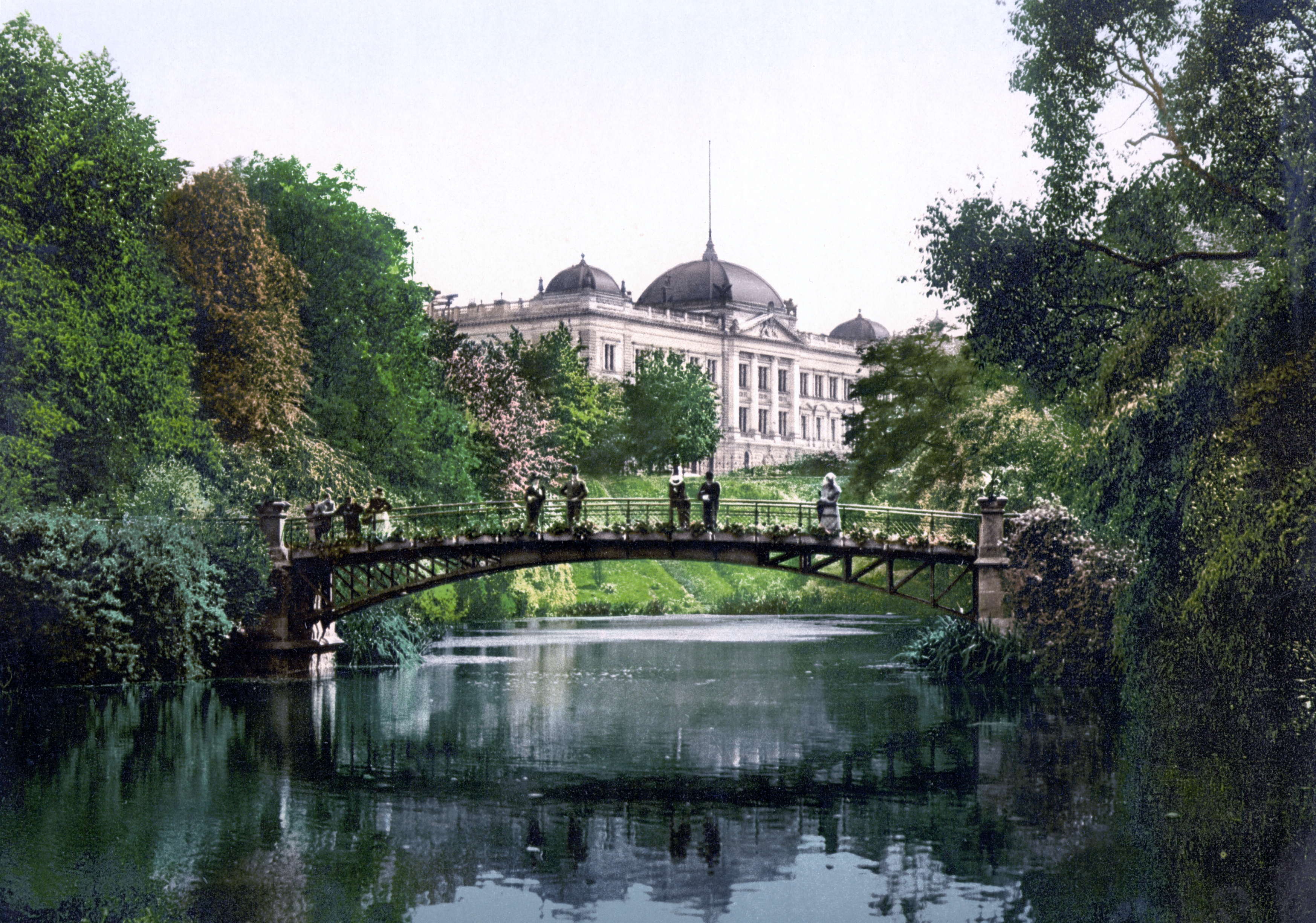 Hamburg, Botanischer Garten. Teil des ehemaligen Stadtgrabens der Befestigung der Wallanlagen. Heute im Park Planten un Blomen. Brücke an dieser Stelle nicht erhalten. Nach dem Zweiten Weltkrieg entstand östlich, in anderem Winkel angelegt, die heutige Johan-van-Valckenburgh-Brücke. Im Hintergrund das Gebäude der Generalzolldirektion, heute Finanzamt am Gorch-Fock-Wall 11